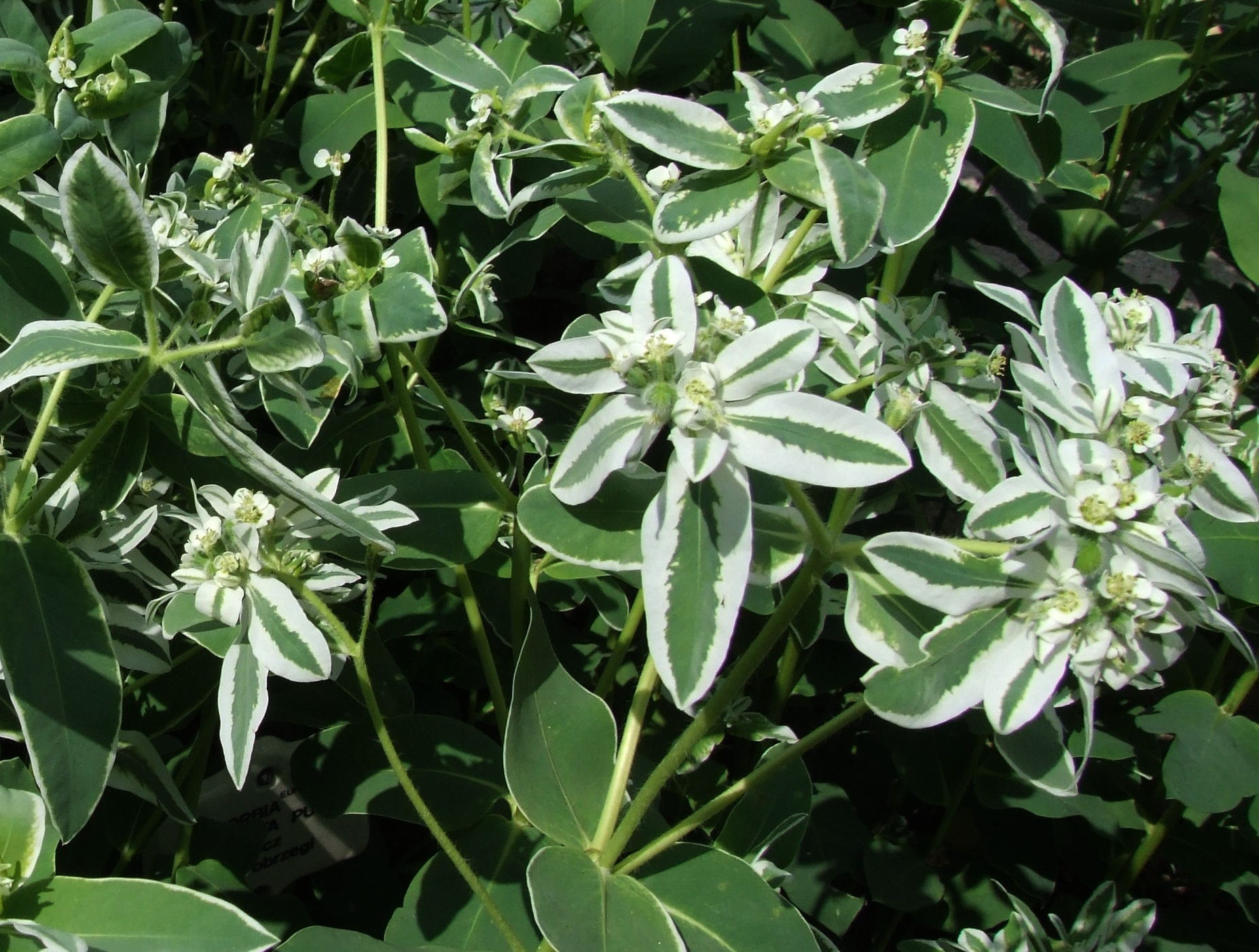 Euphorbia_marginata (pl. wilczomlecz obrzeżony)